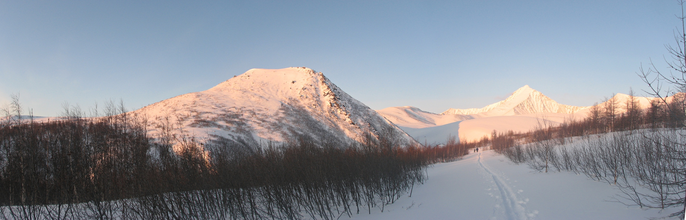 вид в сторону г. Неройка с востока